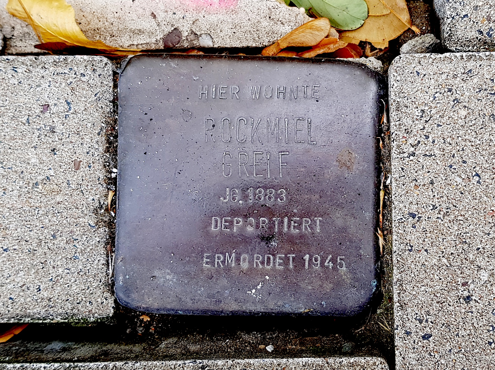 Stolperstein für Rockmiel Greif, Pappendster. 3, Duisburg-Neudorf